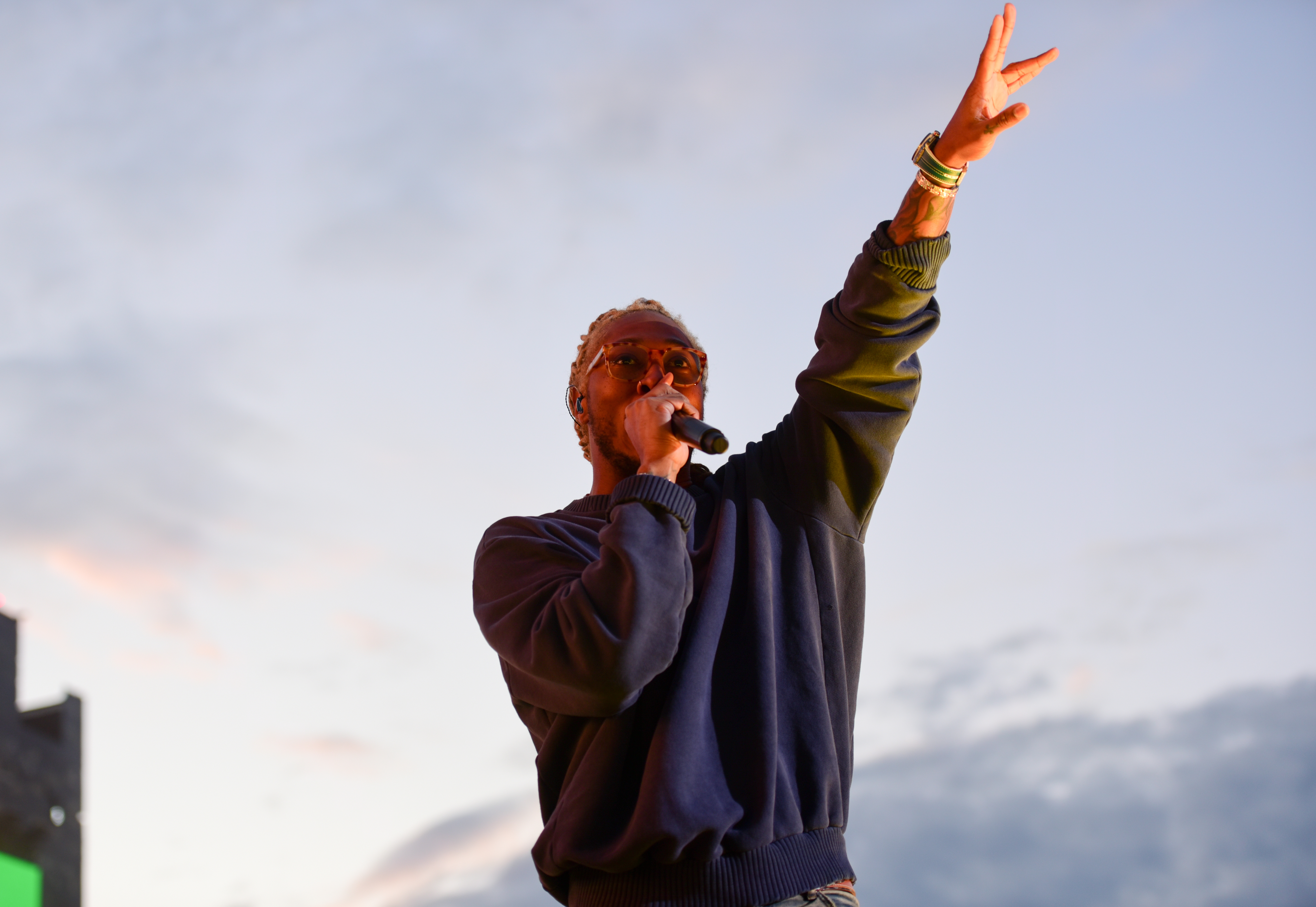 Future live auf dem Openair Frauenfeld 2019